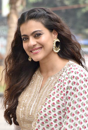 Kajol mempromosikan Tanhaji pada 2019